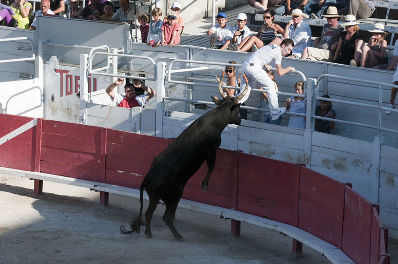 Attaque franche du taureau par dessus les barrières